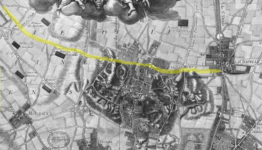 Detail de plan de Roussel de 1730 montrant Montmartre et La Chapelle. La Chemin des Boeufs en surbrillance